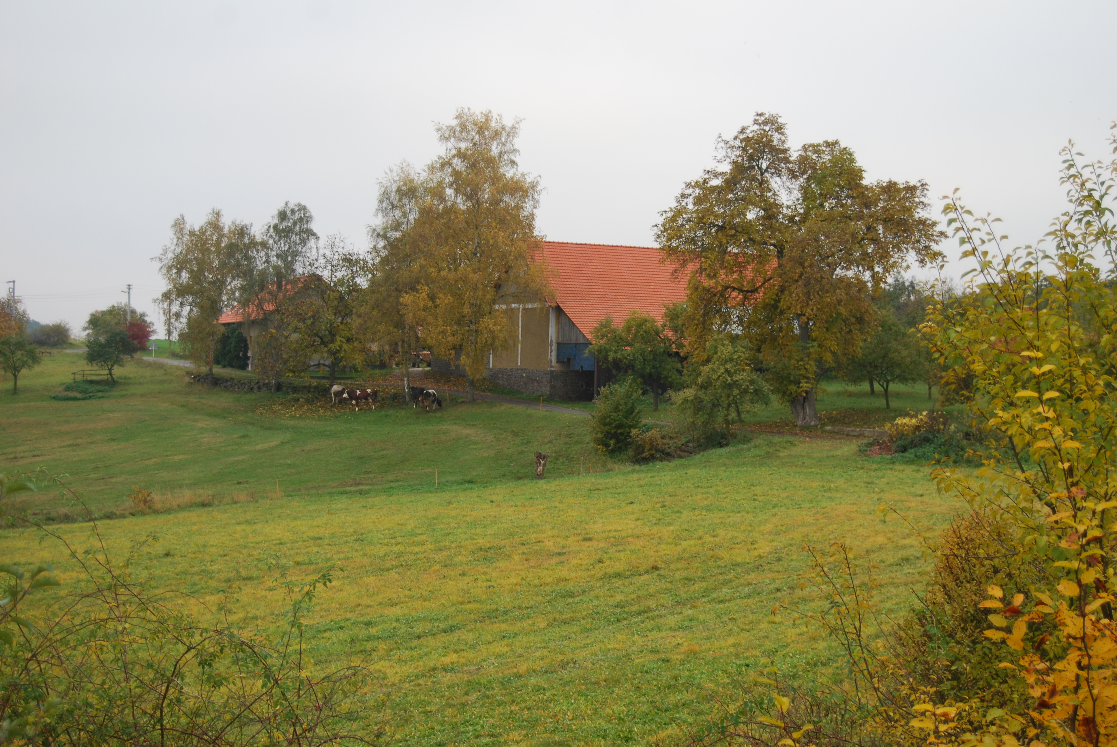 Zemědělská usedlost v obci. Horní Třtí. Třtí je část obce Dolní Hbity v okrese Příbram. Česká republika.